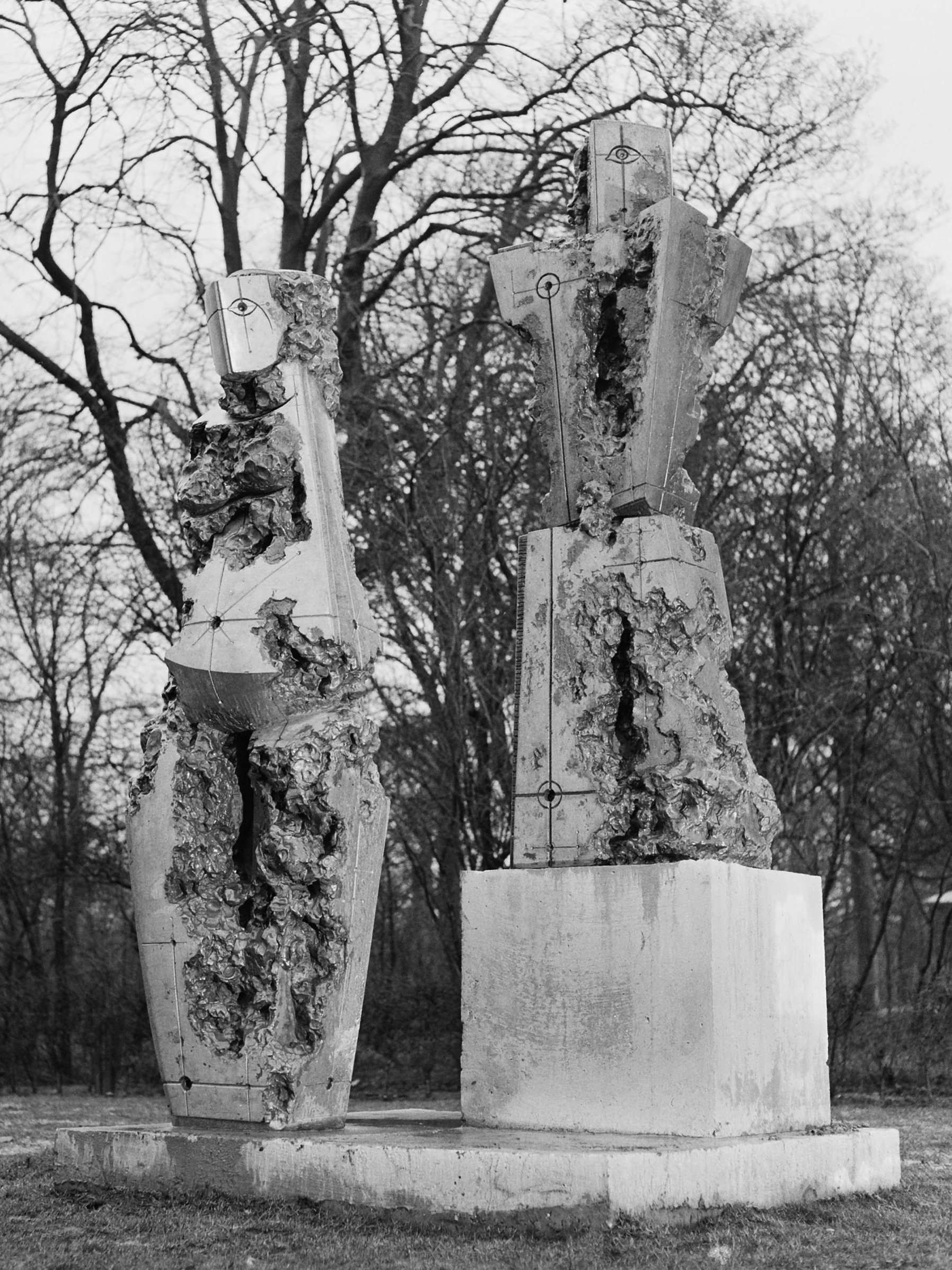 Beeldententoonstelling (t.g.v. 100-jarig bestaan) in Vondelpark, "Man en Vrouw" van Libero Badii (zie ook [1]) 29 maart 1965